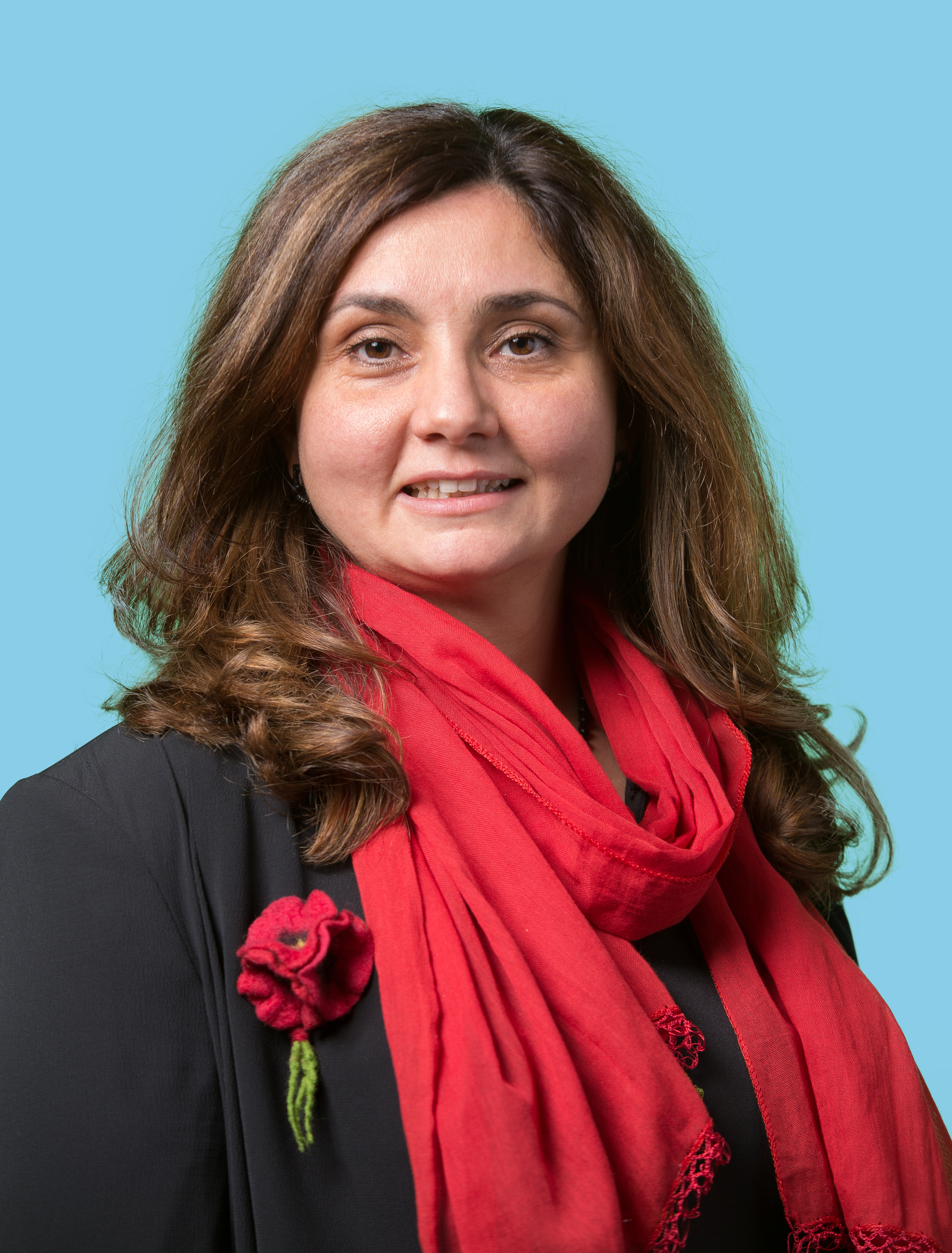 22 november 2016. Tweede Kamerlid voor de Partij van de Arbeid. Foto: Lex Draijer.